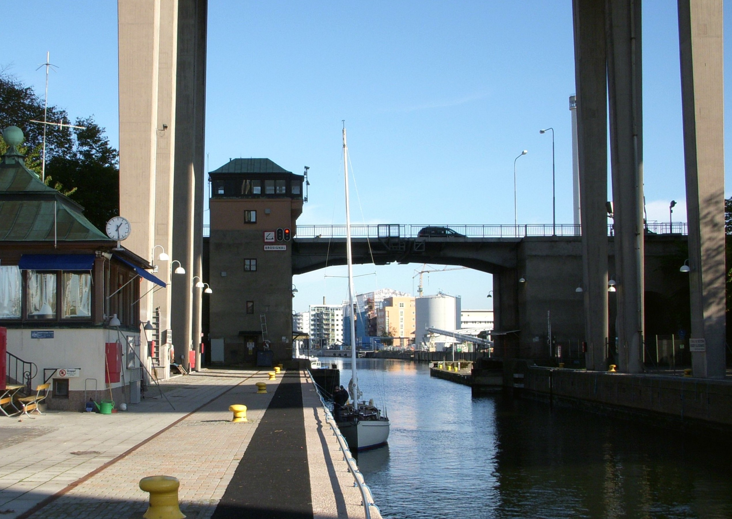 Skansbron under Skanstullsbrons pelare och Hammarbyslussen på Södermalm i Stockholm